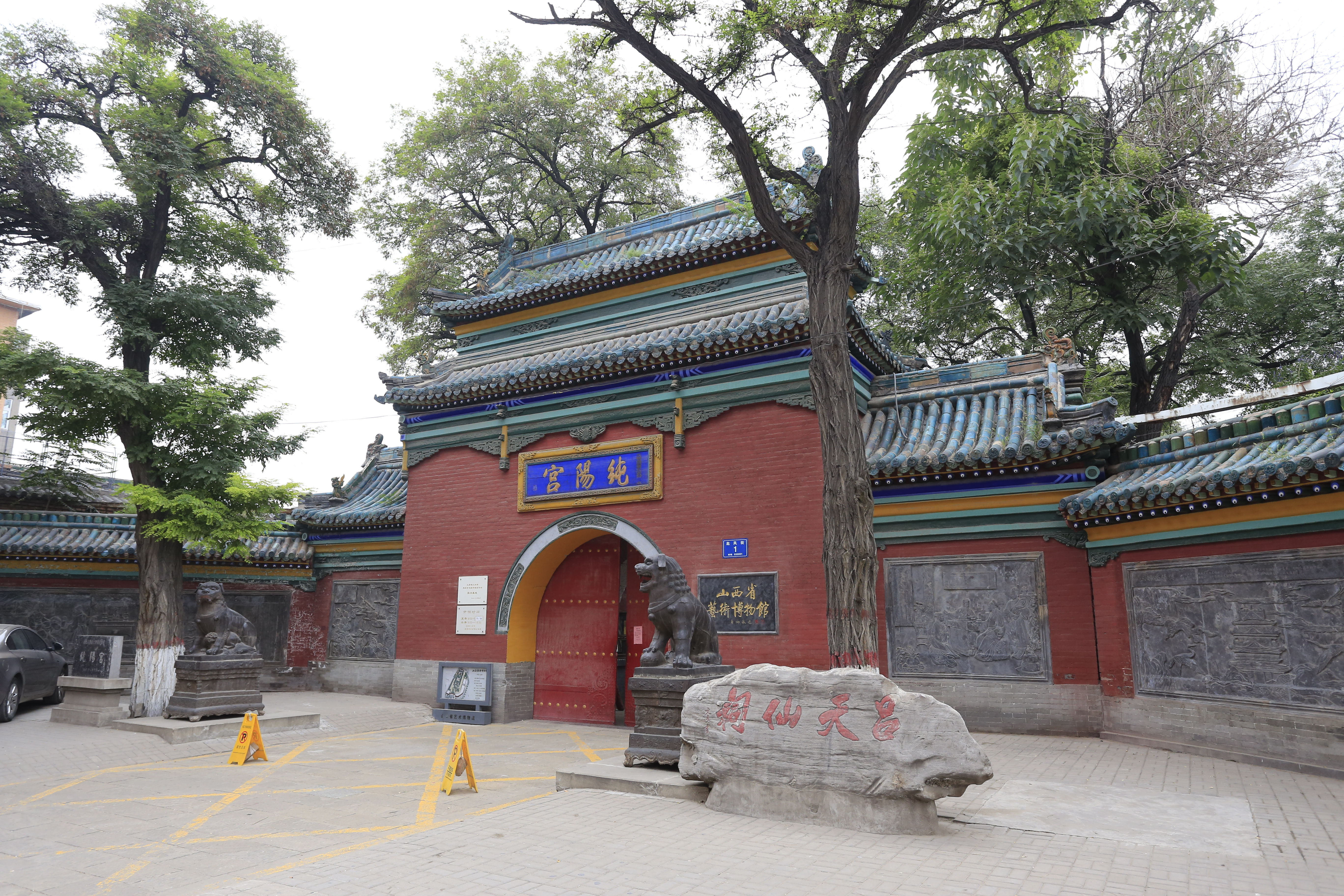 太原纯阳宫